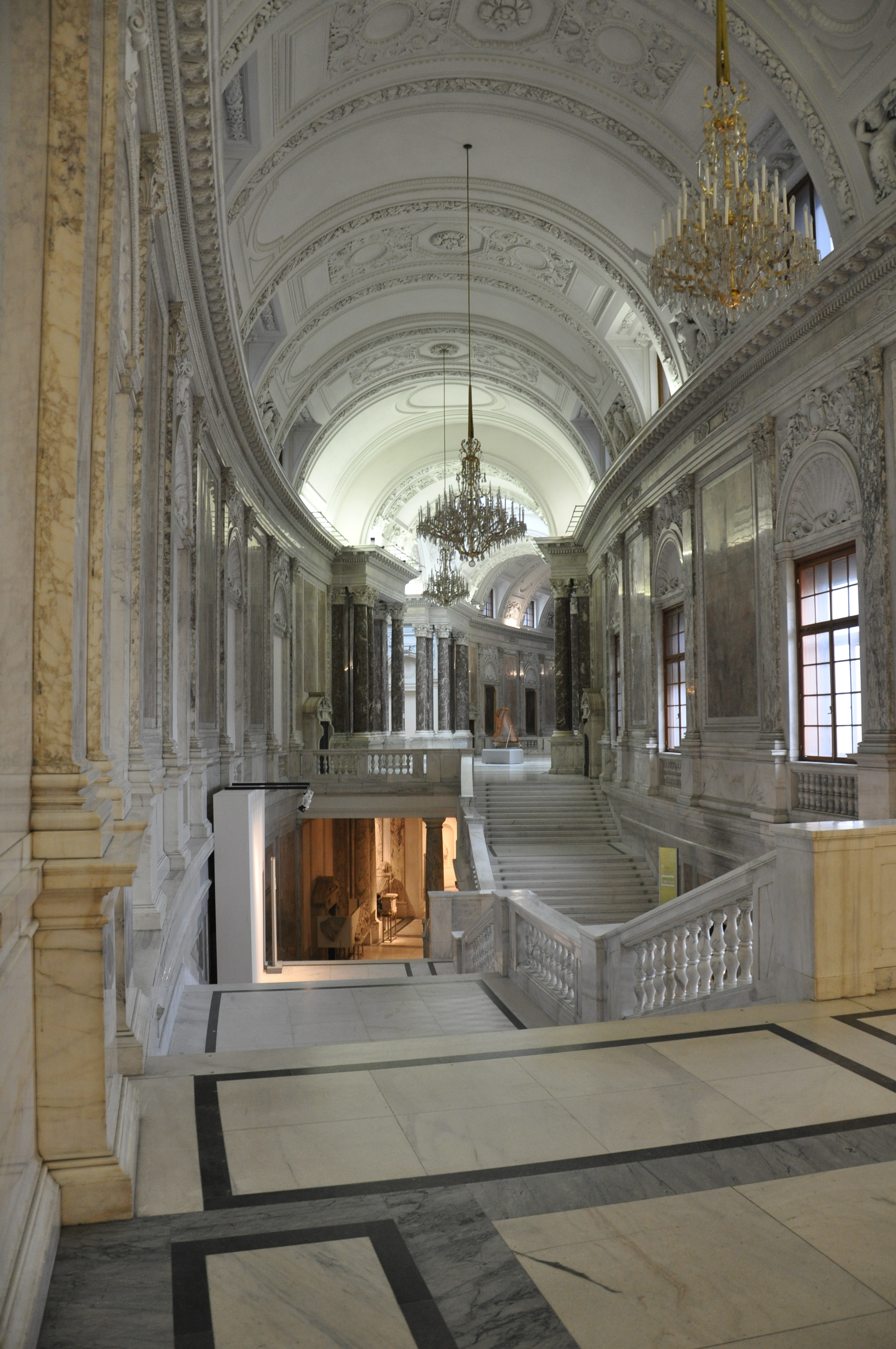 Wien, Neue Burg, Treppenhaus